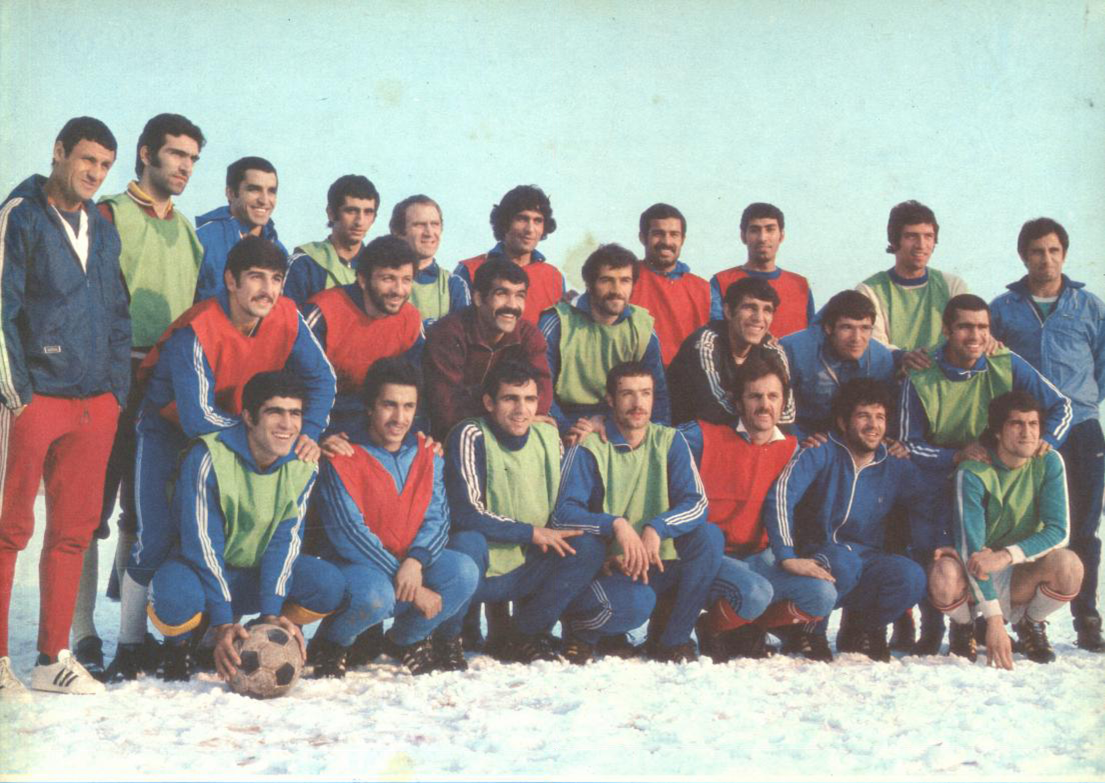 تیم نیروهای مسلح شاهنشاهی در پیکار با نماینده ایتالیا